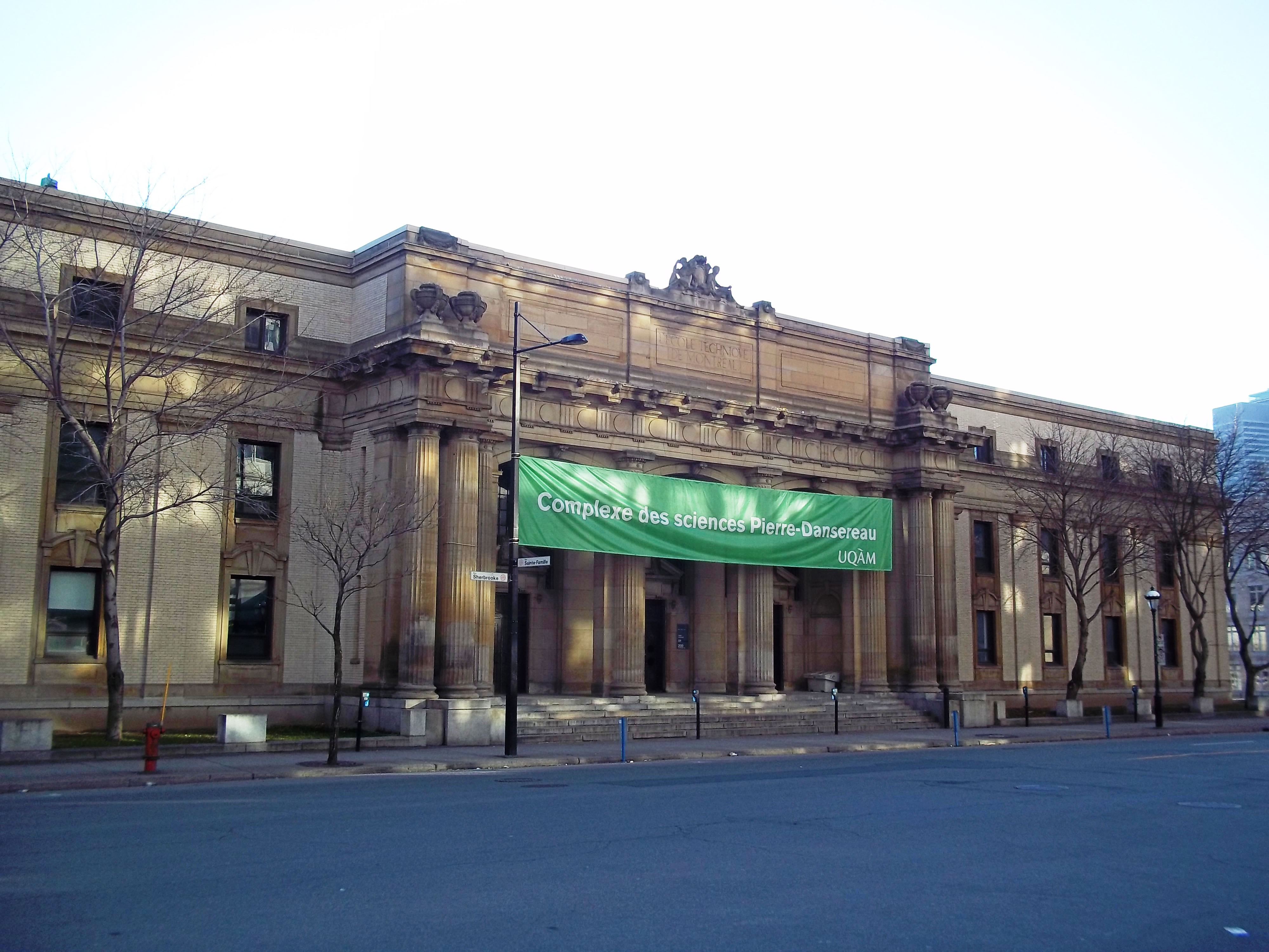 Complexe des sciences Pierre-Dansereau Pavillon Sherbrooke (ancien édifice de l'École technique de Montréal), 200, rue Sherbrooke Ouest, Montréal